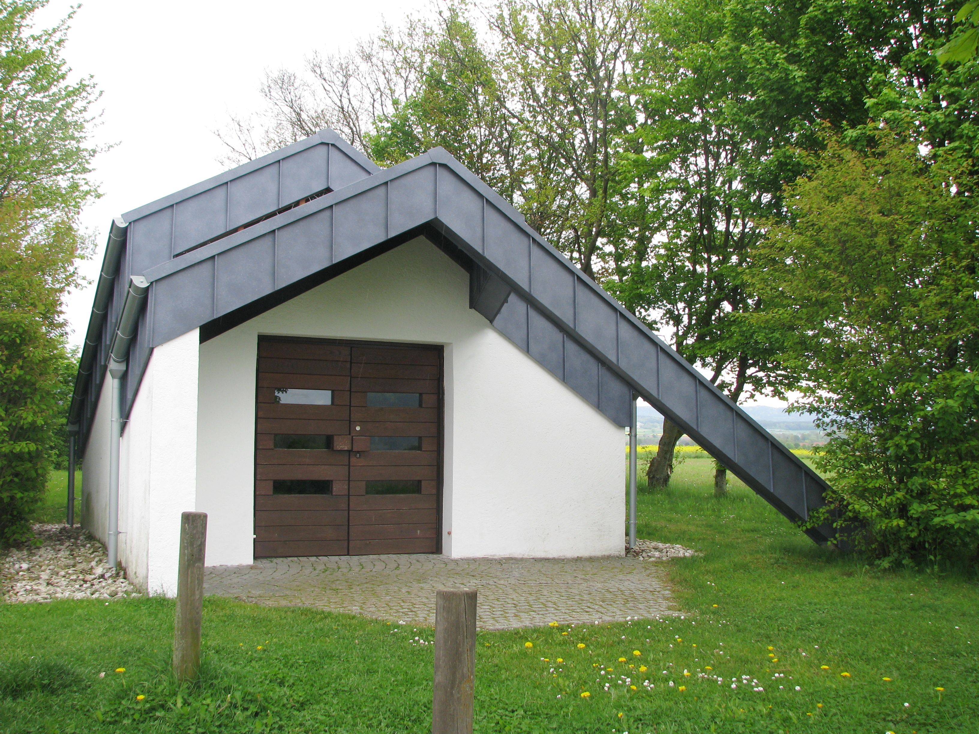 Hausheim, Ortsteil von Berg bei Neumarkt i. d. Opf., Friedenskapelle